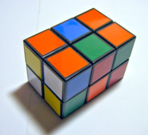 轉亂後的2x2x3魔術方塊